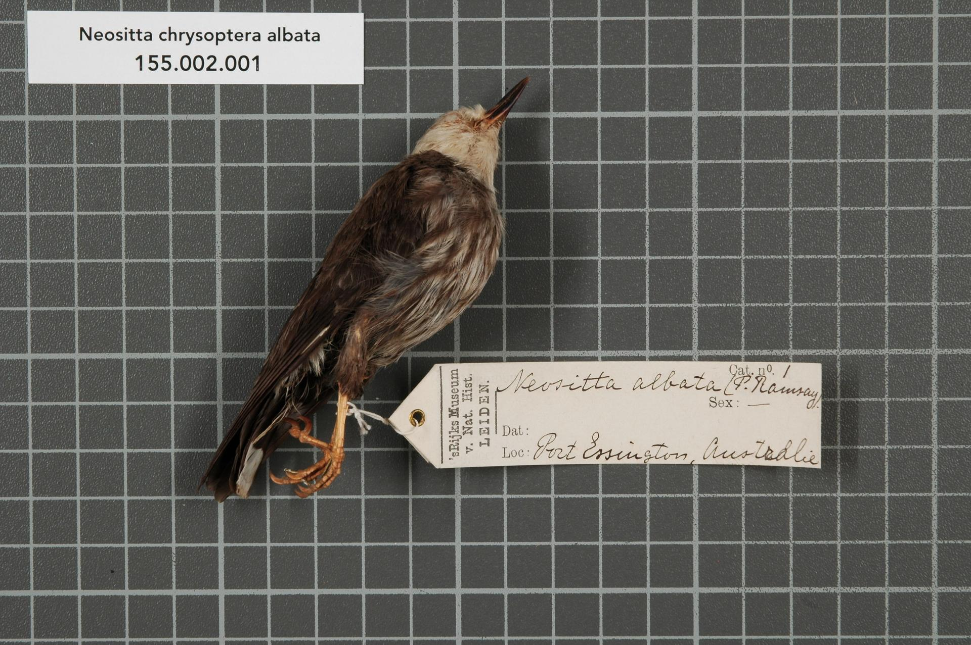 Neositta chrysoptera albata (Ramsay, 1877)